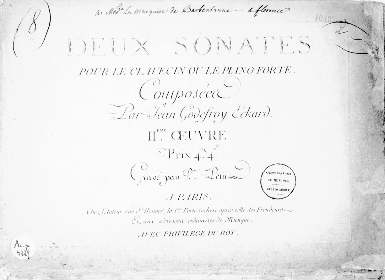 Page de titre des Sonates pour piano de Johann Gottfried Eckard, publiées en 1764.